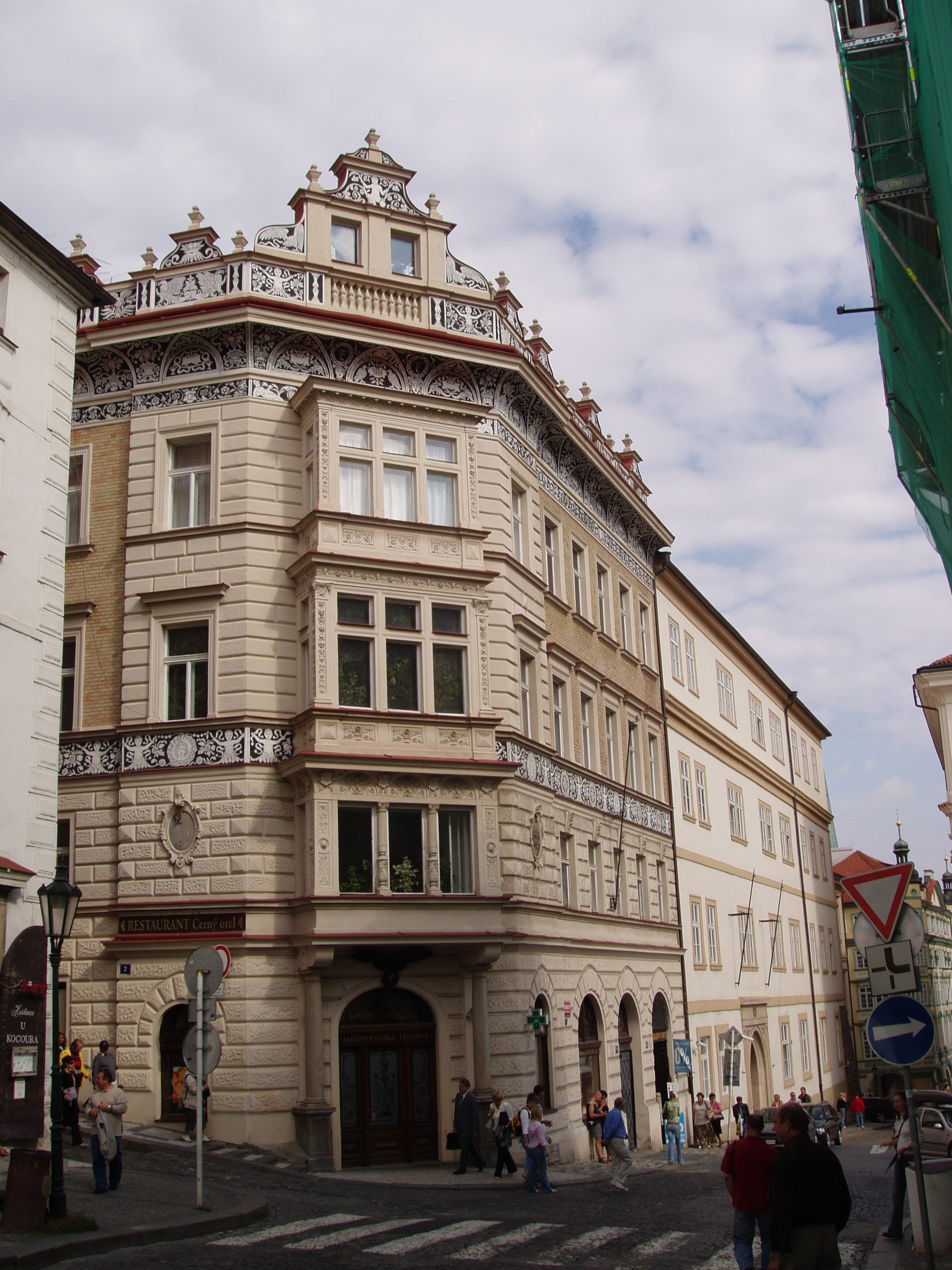 černý orel